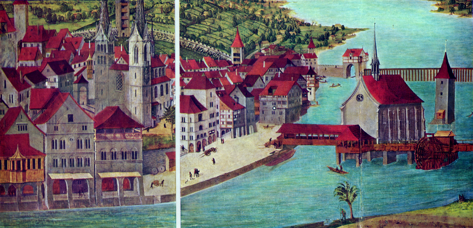 Älteste zuverlässige Darstellung der Stadt Zürich, Ende des 15. Jahrhunderts auf den Altartafeln aus dem Grossmünster in Zürich von Hans Leu d. Ä., linke Seite. Zustand der Altartafeln vor der Freilegung der Szenen aus dem Martyrium von Felix und Regula, die nach der Reformation übermalt worden waren. Die Tafeln befinden sich heute im Schweizerischen Landesmuseum.